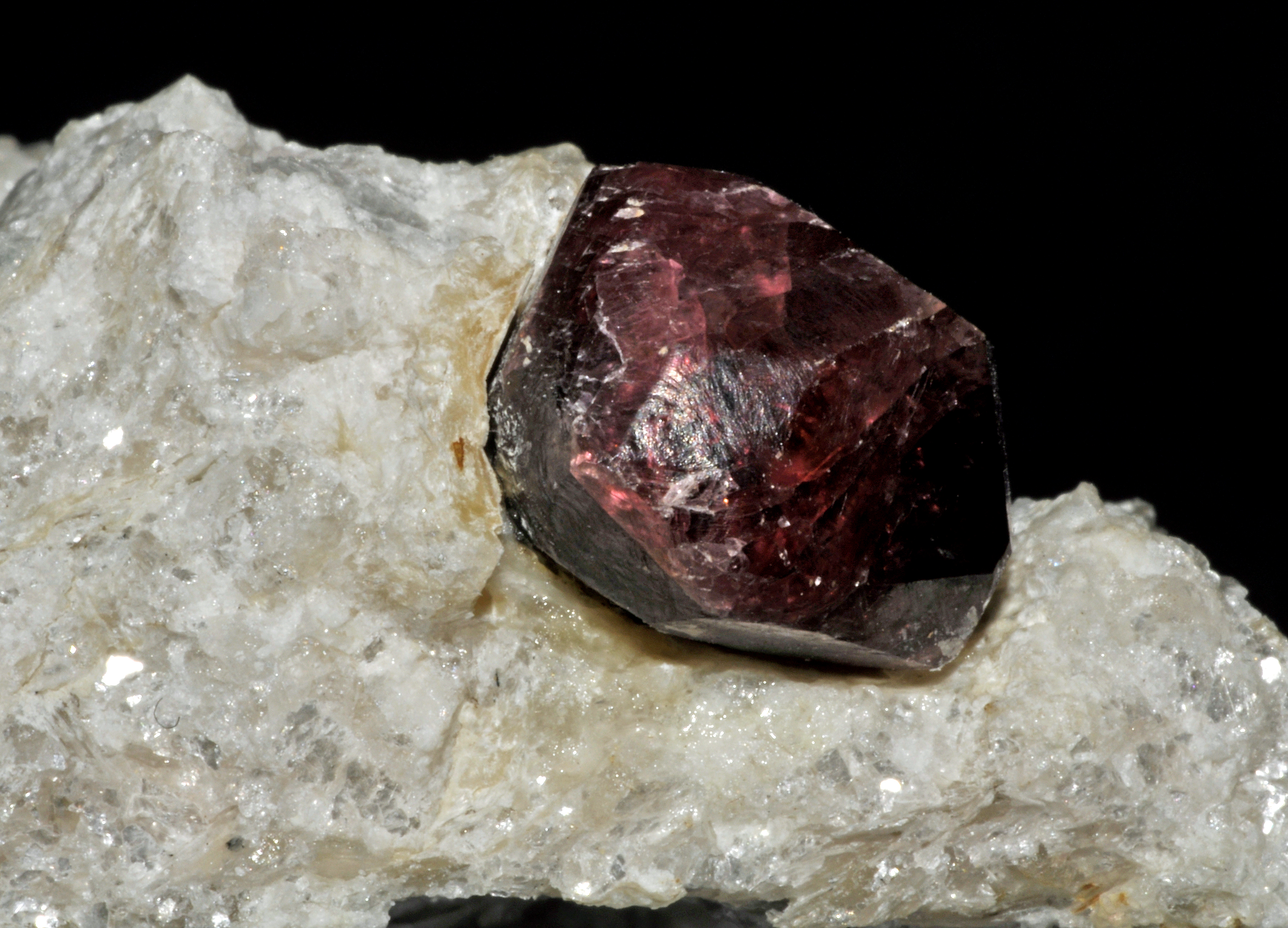 cristal de grenat var. pyrope sur gangue